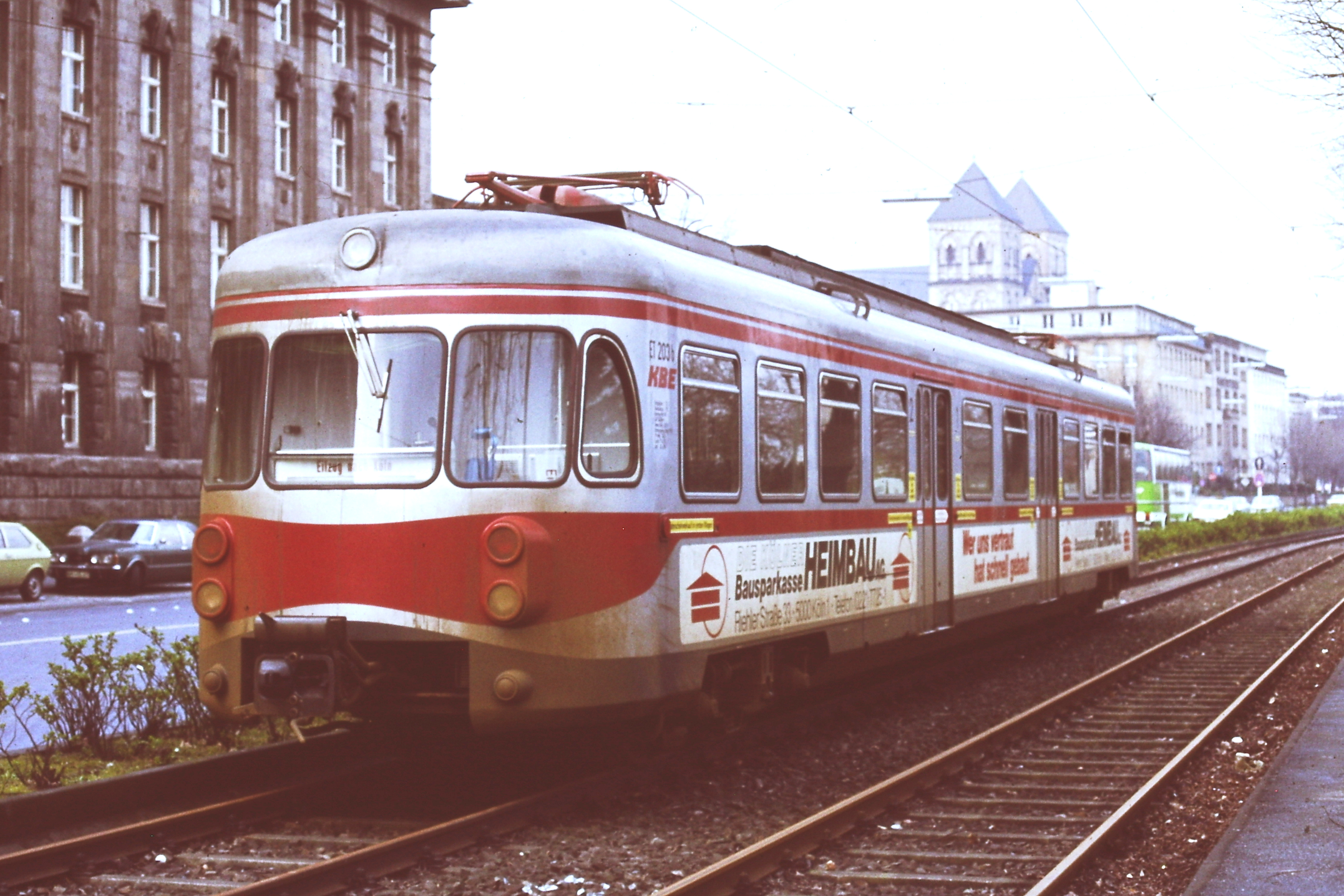 Köln-Bonner Eisenbahnen (KBE) treinstel van het type ET nr: 203 te Köln Hohenzollernbrücke.